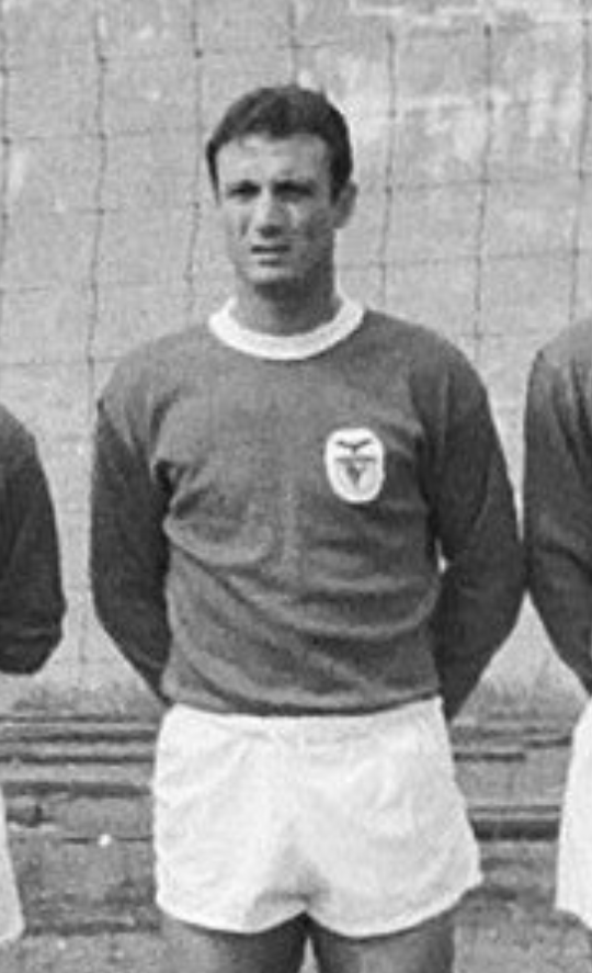 Domiciano Cavém con el Benfica en 1965